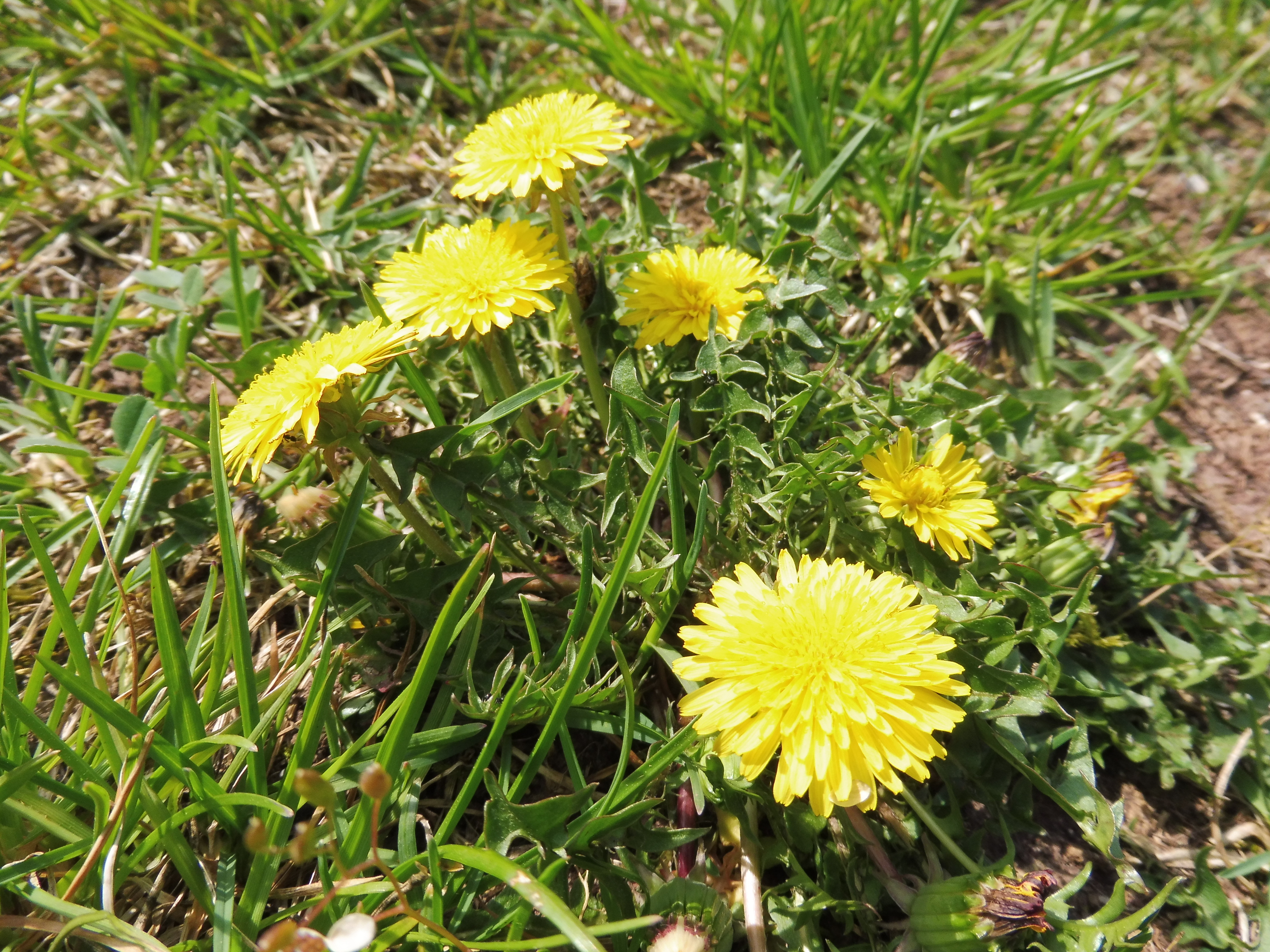 Schlesischer Löwenzahn (Taraxacum parnassicum) Cleebronn Michaelsberg 18. April 2018